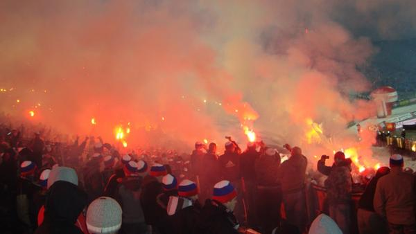 Wielkie Derby Śląska 28 II 2009